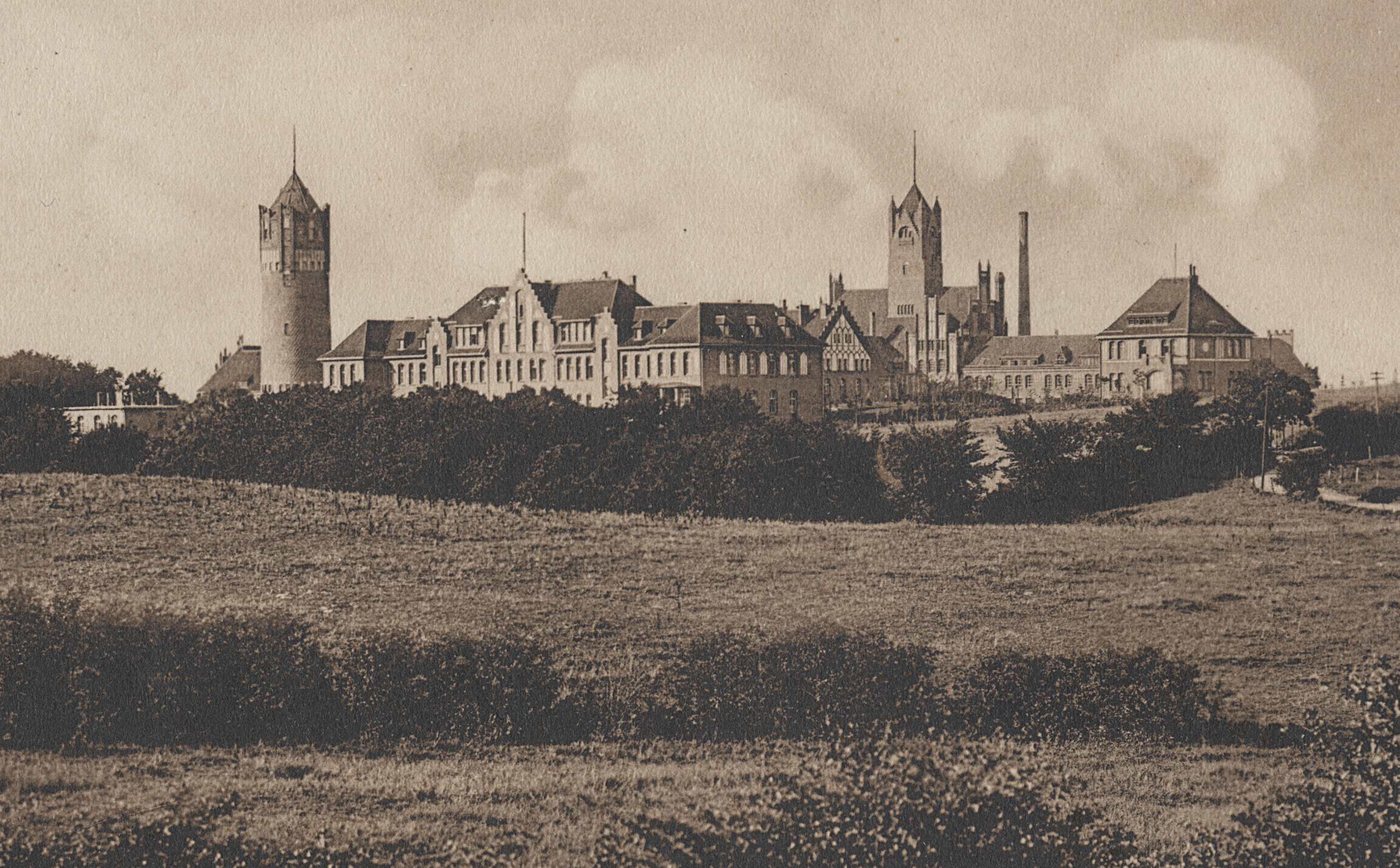 Marineschule Mürwik (Mürwiker Burg) um 1910, Flensburg